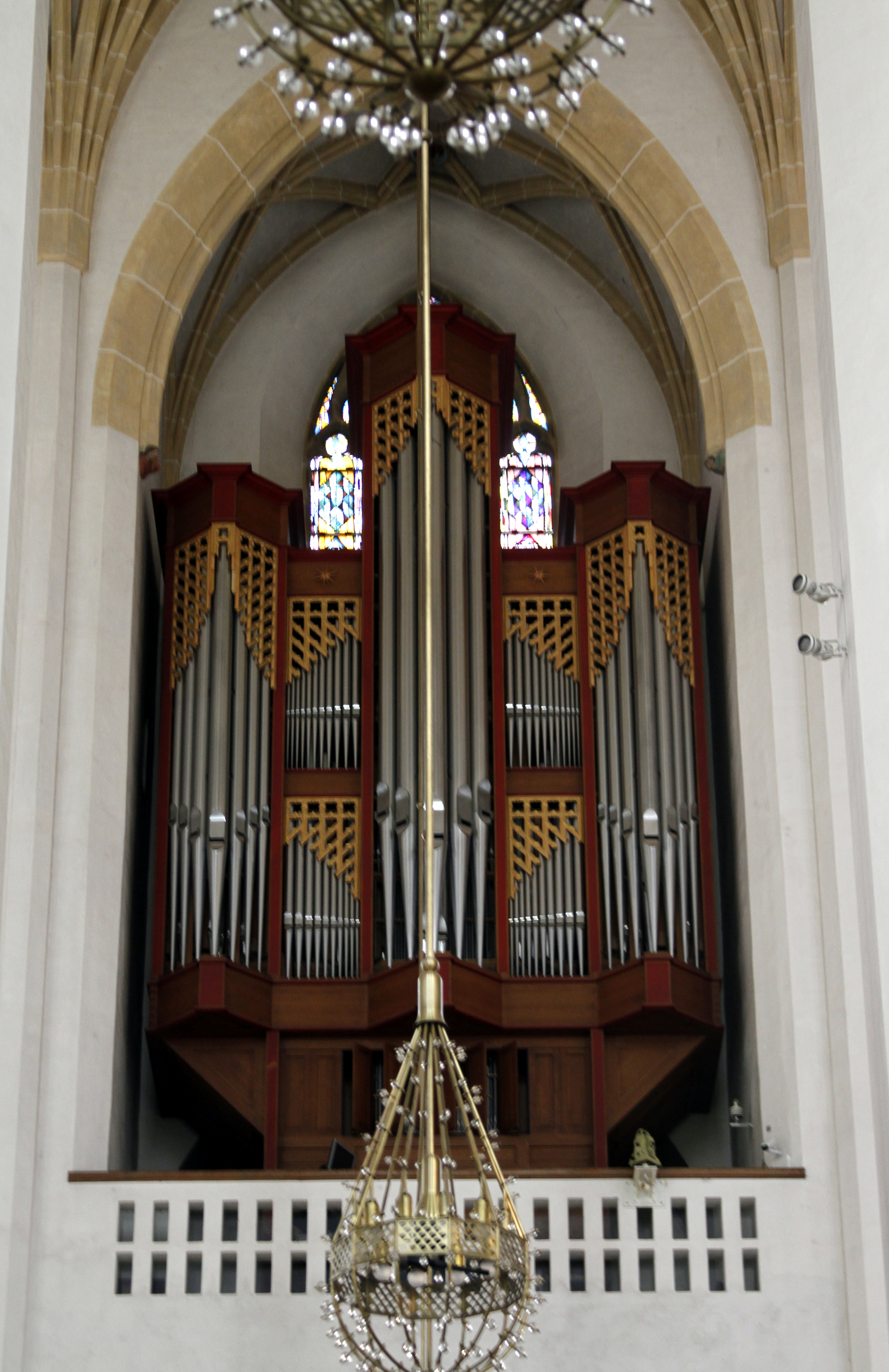 Frauenkirche - Munich - Germany